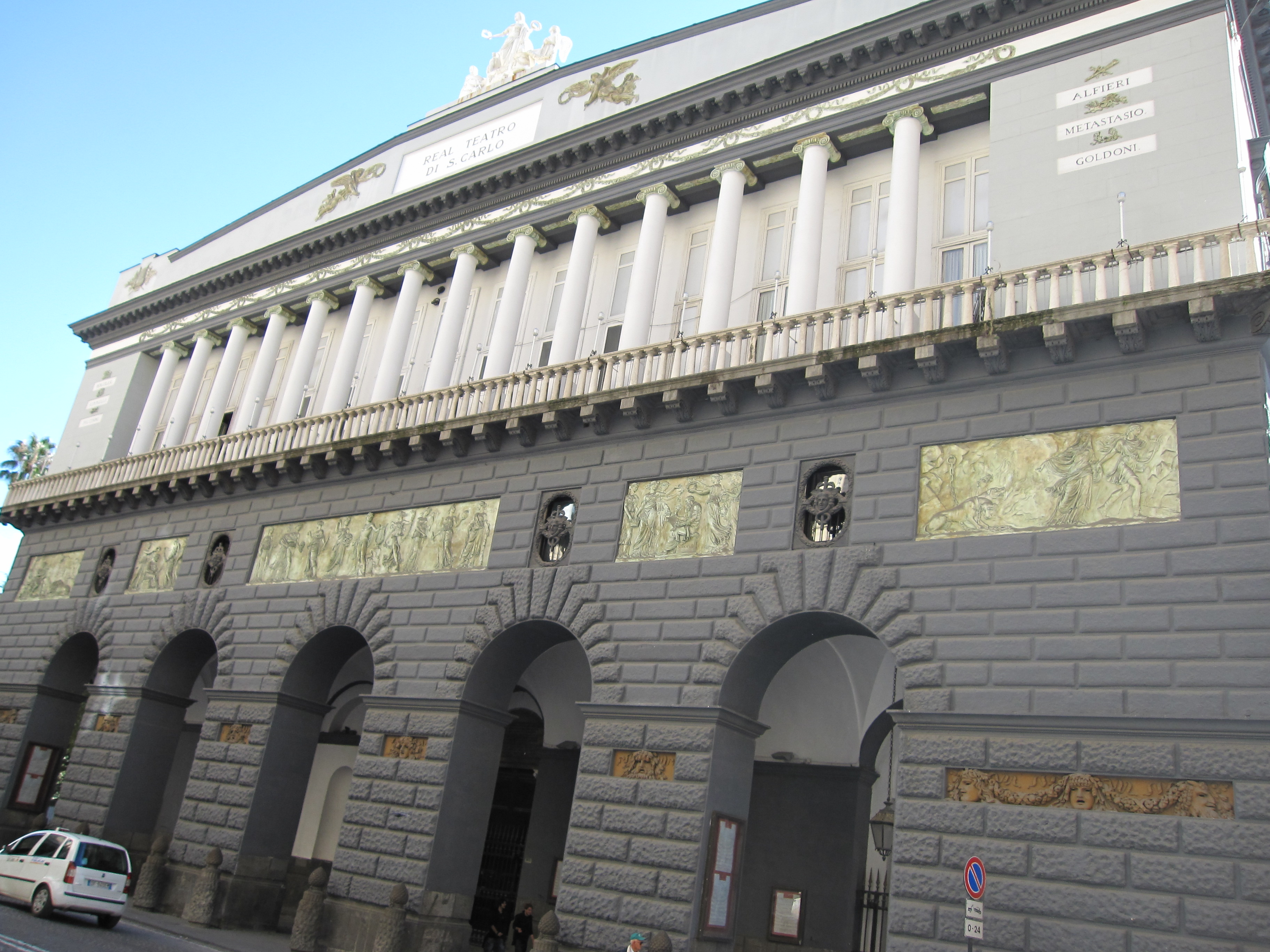 Real Teatro San Carlo di Napoli. La facciata su Via San Carlo.